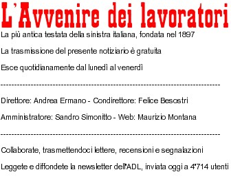 Testata AdL